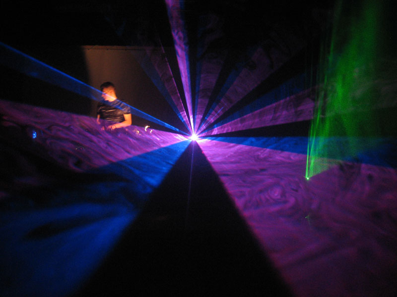 Dj Falk